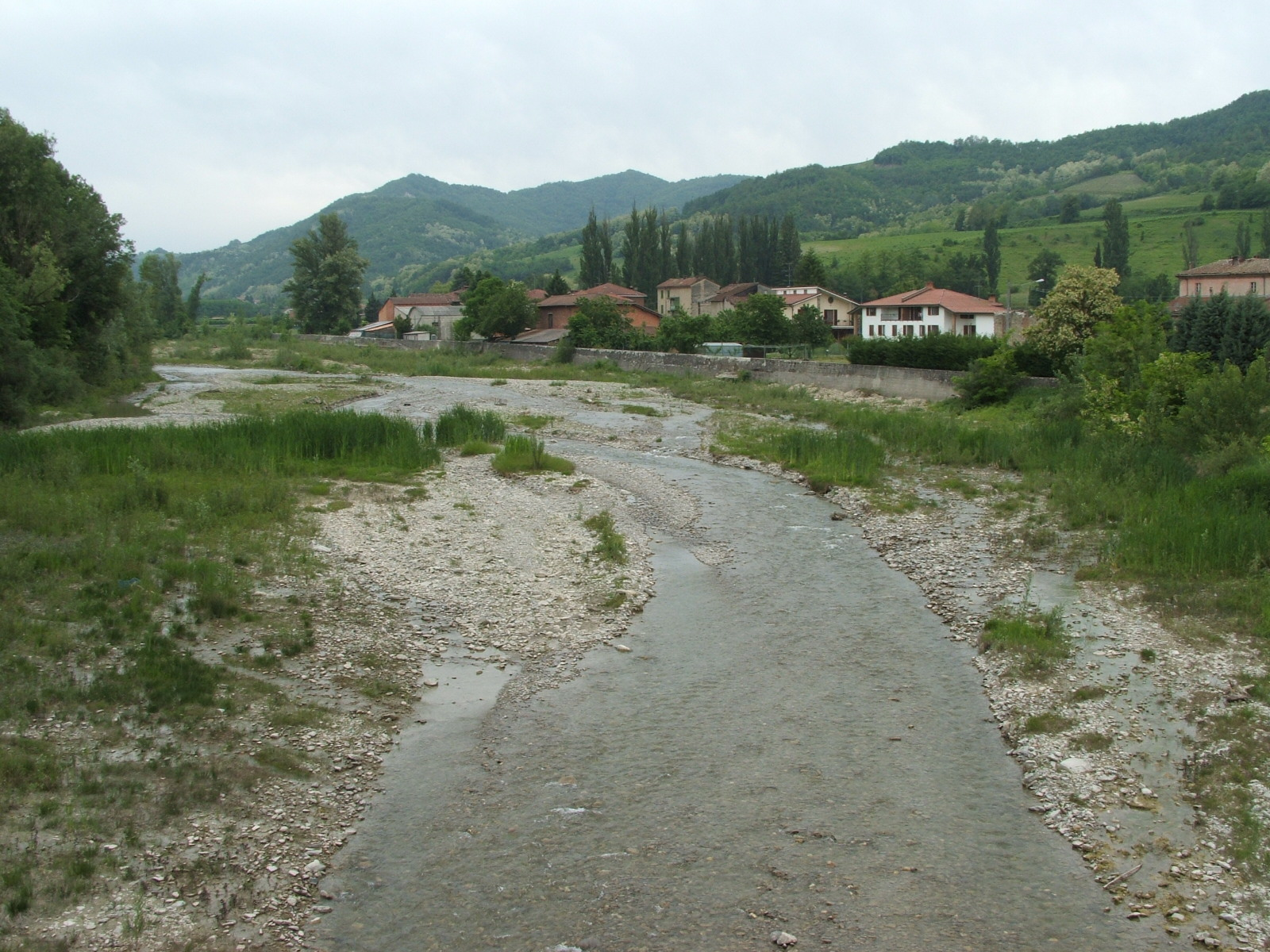 Nostre foto dalla Val Curone Brignano-Frascata - fiume Curone